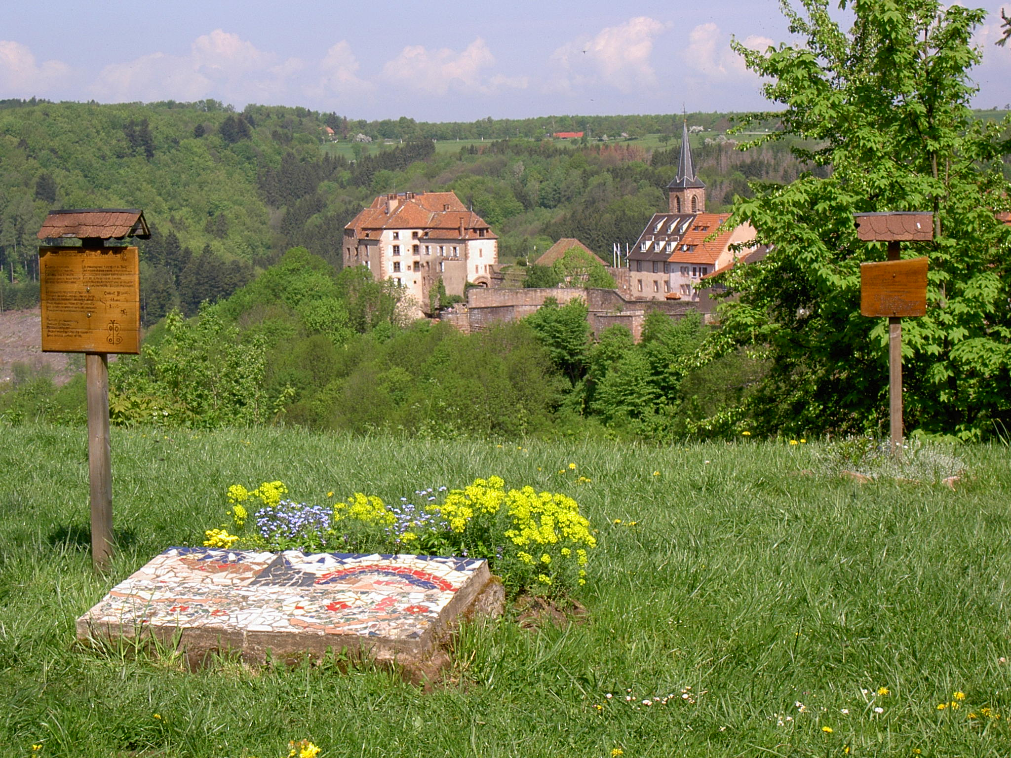 La Petite-Pierre